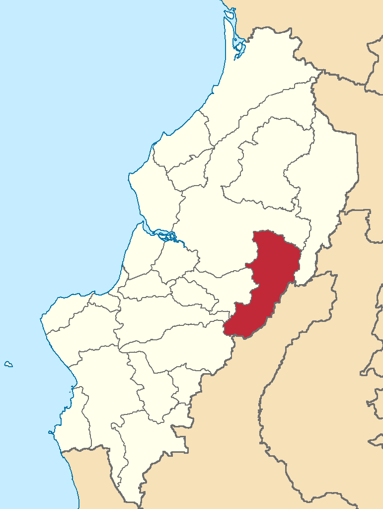 Mapa localizador del cantón en Manabí, Ecuador